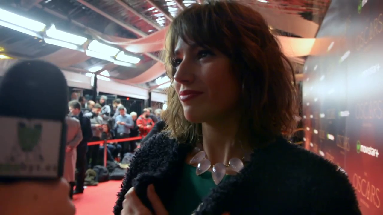 Corbero